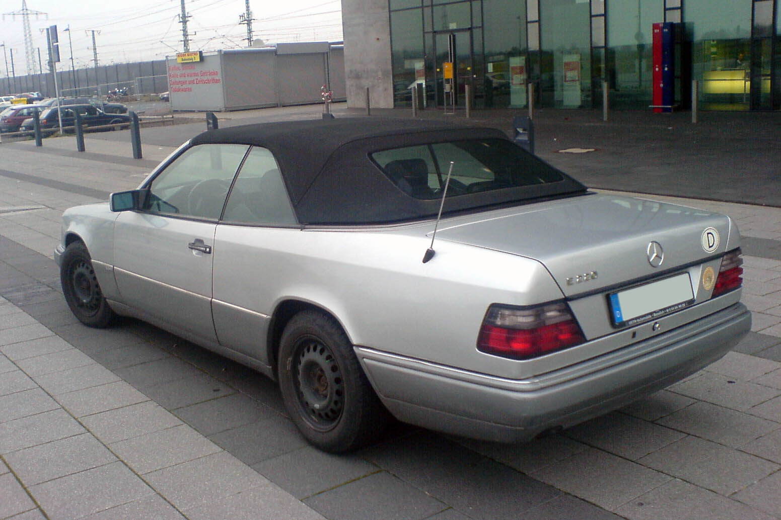 Mercedes-Benz E-Class Convertible